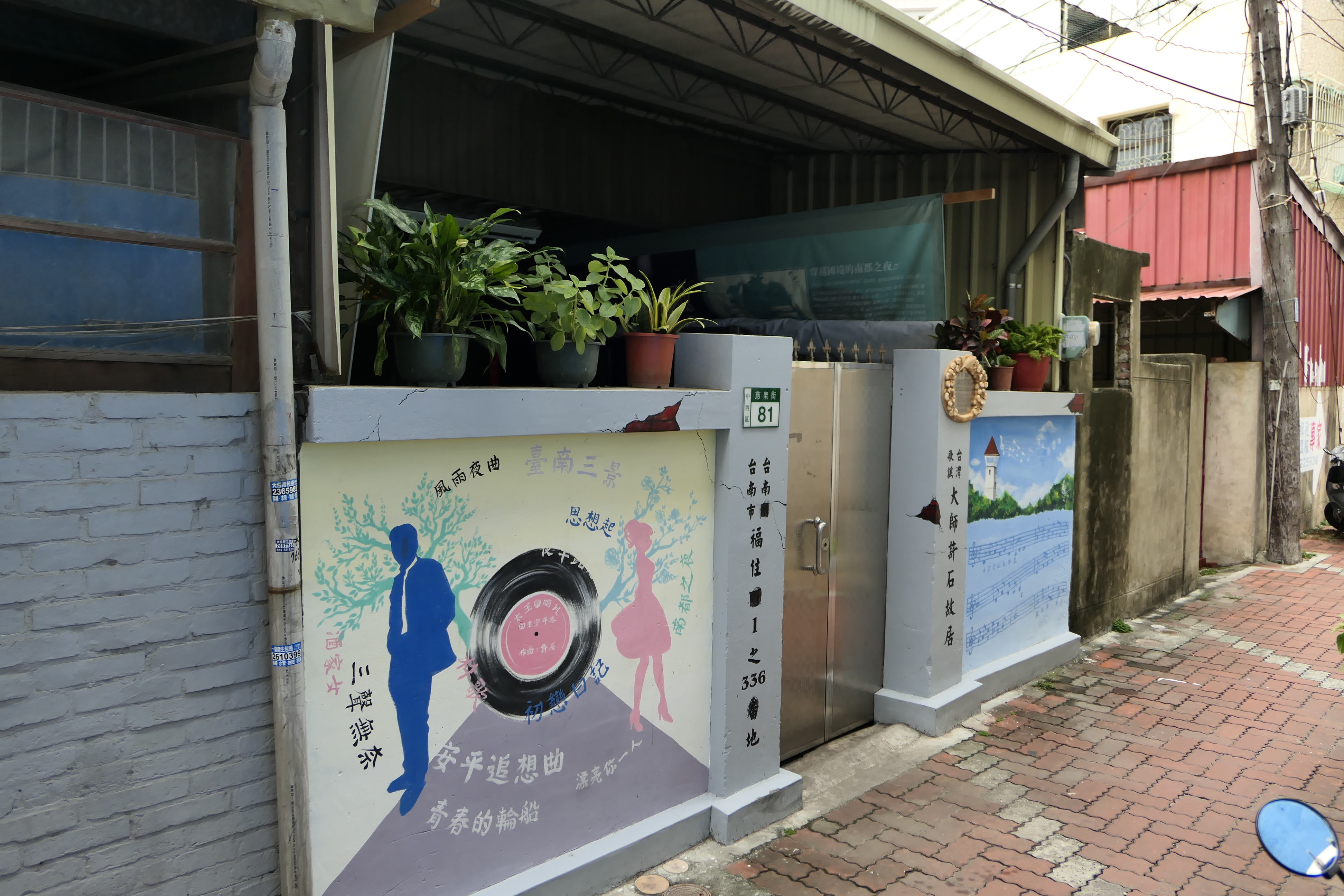 臺南許石故居